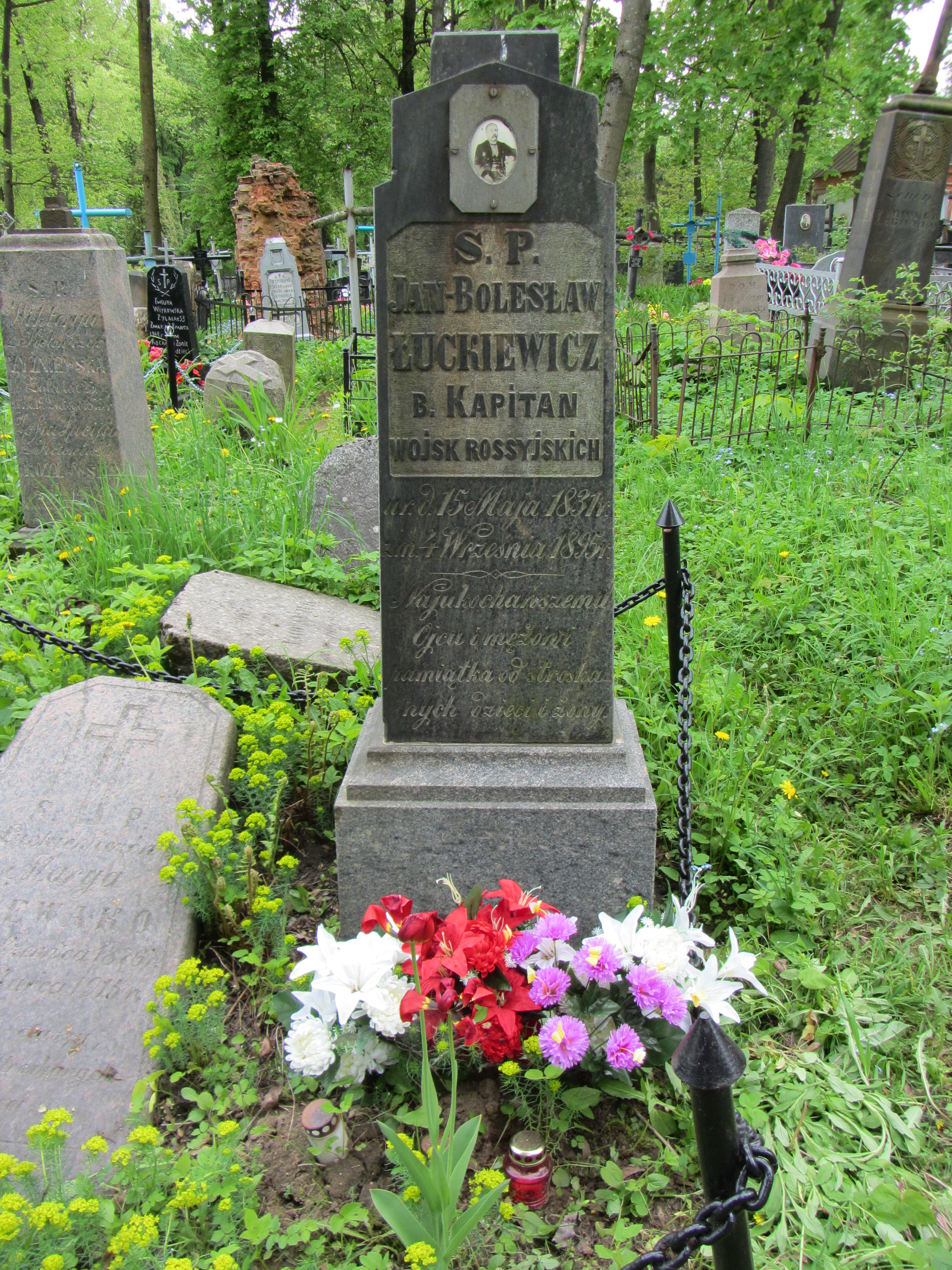 Беларуская (тарашкевіца): Магіла Яна Баляслава Луцкевіча на Кальварыйскіх могілках у Менску.